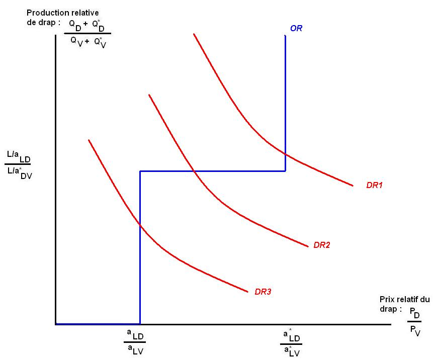 Brouillon pour article avantage comparatif